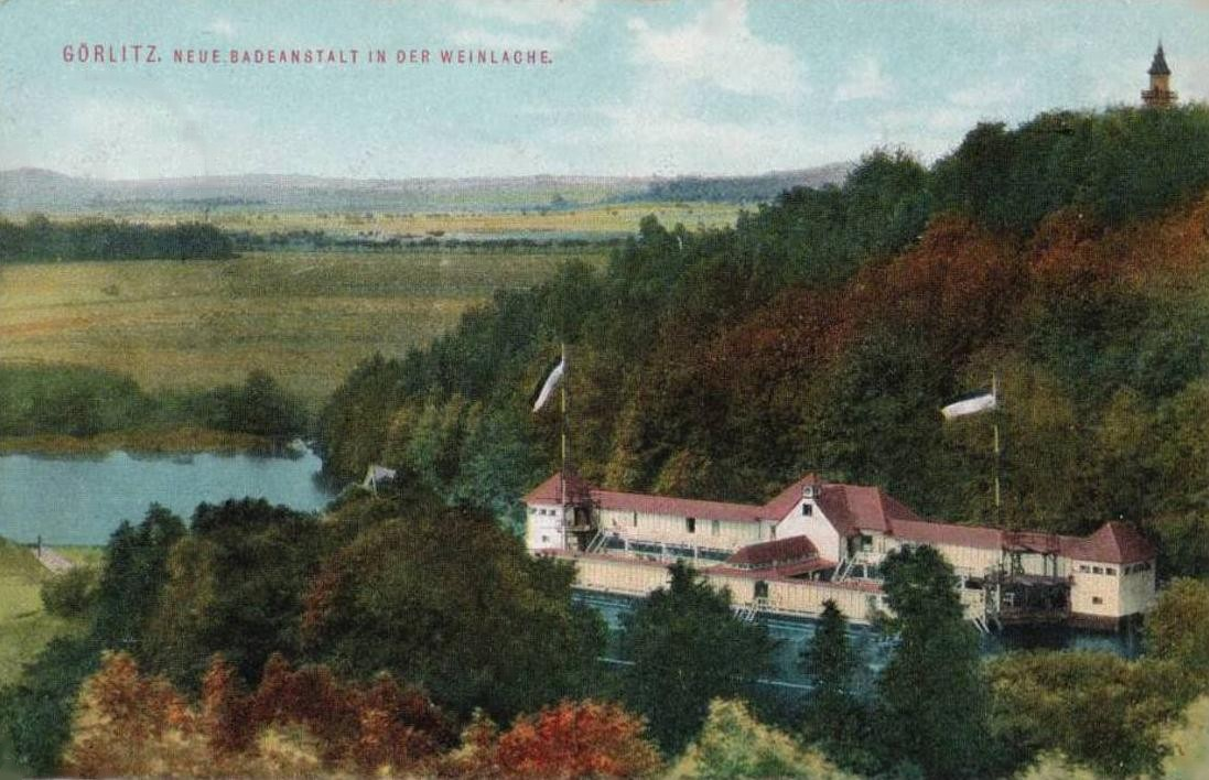 Die einstige Flussbadeanstalt in der Weinlache an der Lausitzer Neiße in Görlitz